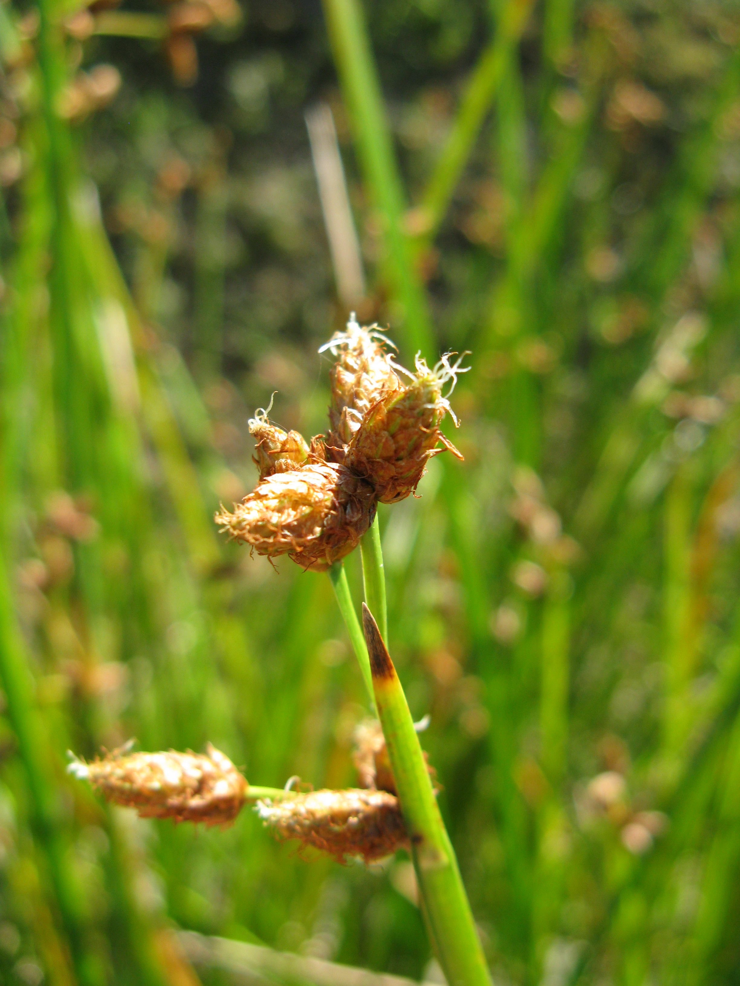 Scientific name Schoenoplectus triqueter